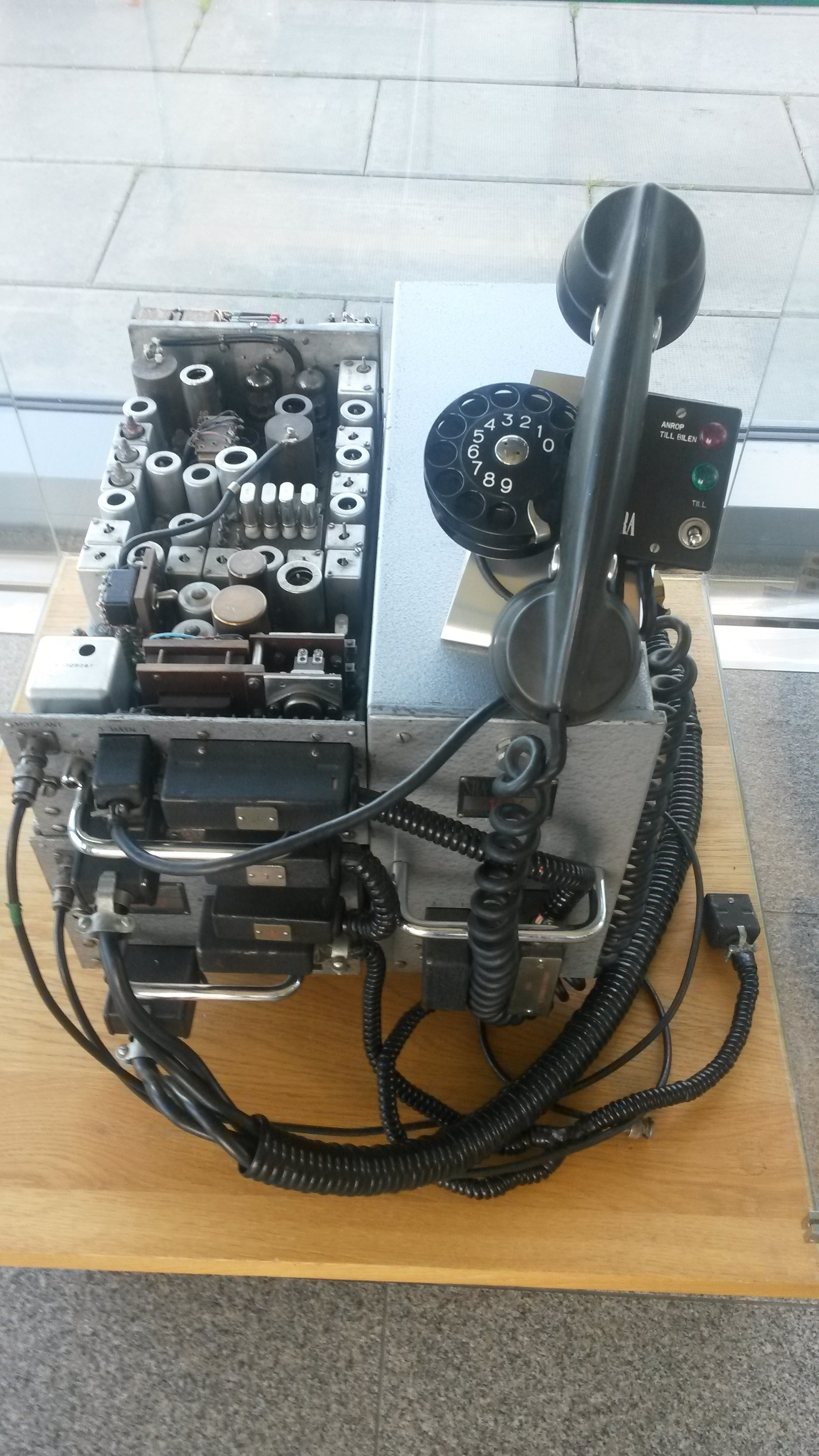 Detta systemet konstruerades av Sture Lauhrén 1951 och var det första helautomatiska biltelefonsystemet i världen. Provsystemet användes i Stockholms läkarbilar från nyåret 1955.